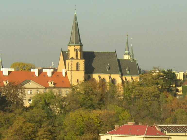 St. Apollinare Church, Nové Město, Prague, Czech Republic Kostel sv. Apolináře na Novém Městě v Praze Photo taken by Miaow Miaow in October 2005, PD-self